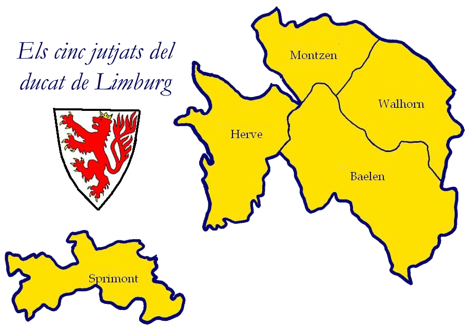 Els cinq jutjats històrics del ducat de Limburg